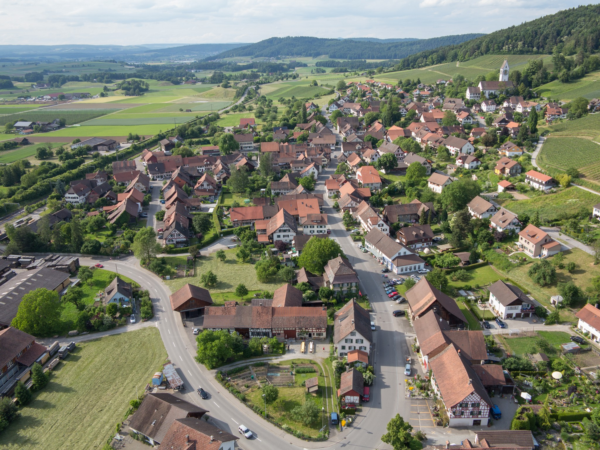 Unterstammheim 2013-06-15